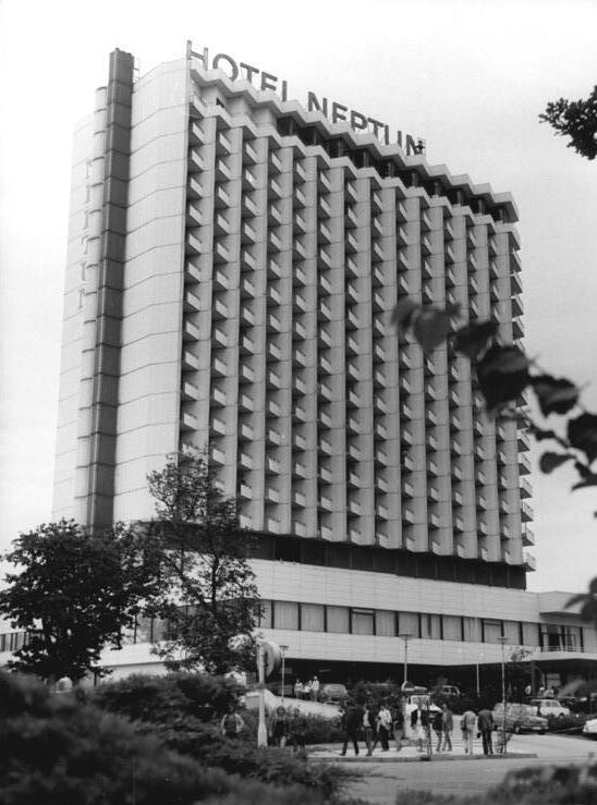 Warnemünde, Interhotel "Neptun" ADN-ZB Mellahn 3-7-82-me-Rostock: Interhotel "Neptun" - Mehr als eine Million Mitglieder des FDGB verlebten in den vergangenen zehn Jahren einen Urlaub in ausgewählten Interhotels und Hotels der DDR. Grundlage für solche Erholungsreisen in bester Qualität war ein 1971 gefaßter gemeinsamer Beschluß des Politbüros des ZK der SED, des Präsidiums des Bundesvorstandes des FDGB und des Ministerrates der DDR zur Entwicklung des Feriendienstes der Gewerkschaften. Zu den Interhotels, die FDGB- Urlauber aufnehmen, gehören u.a. das "Neptun" in Warnemünde. Der FDGB wendet 35 Prozent seiner Gesamtausgaben für Urlaub und Erholung der Werktätigen auf.